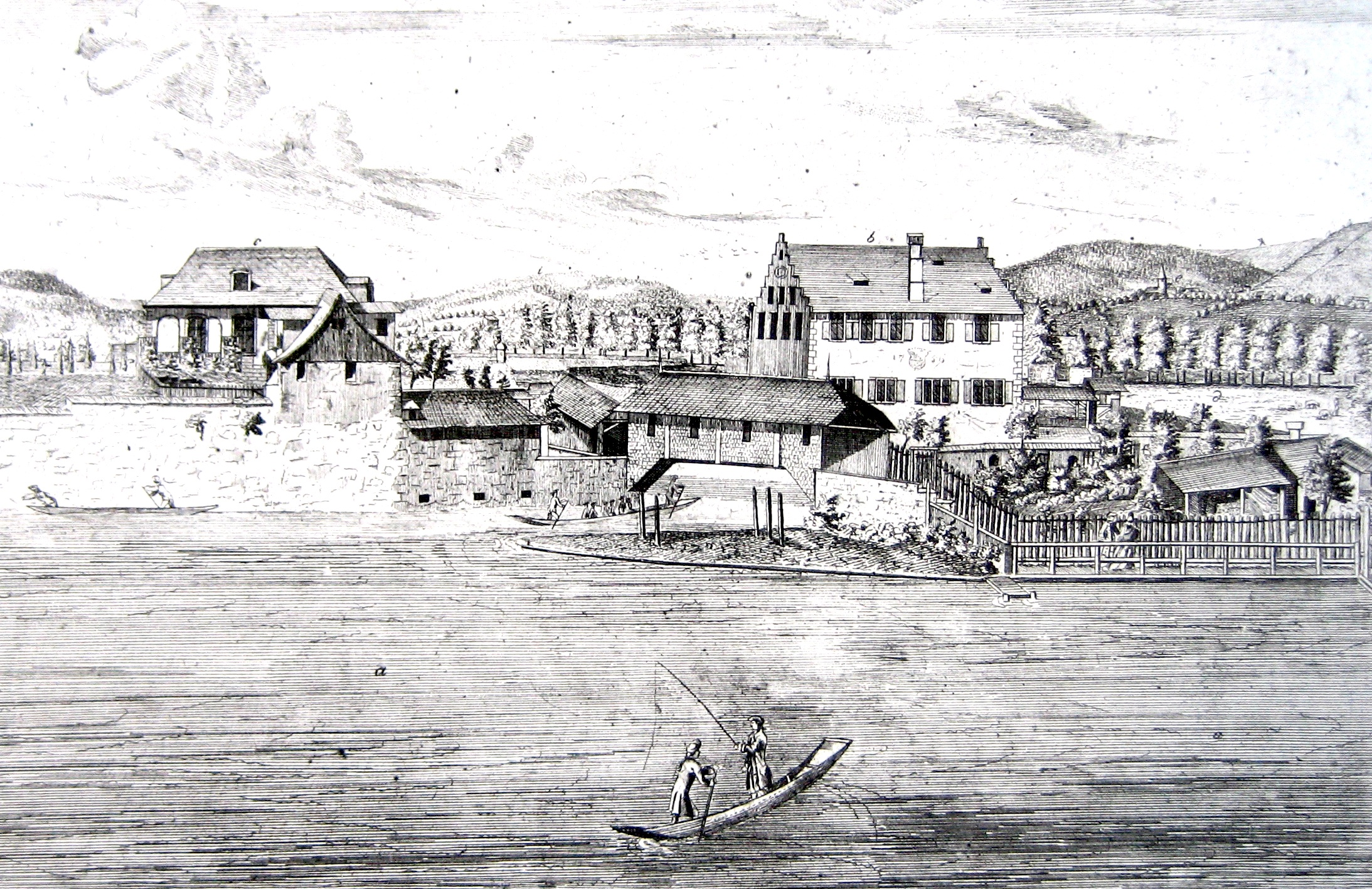 Gedecktes Brüggli, Stich von 1780